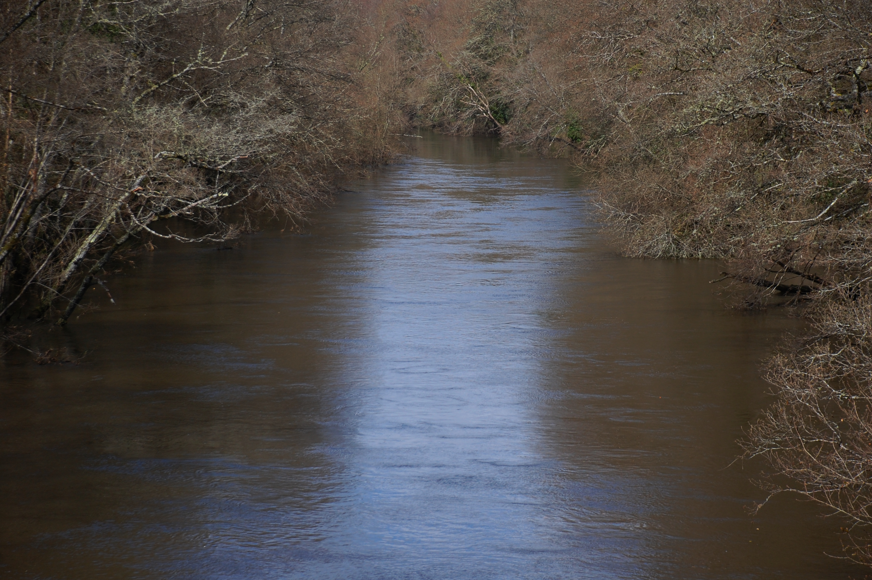 Río Ladra en Begonte, a altura da ponte da estrada a Friol.